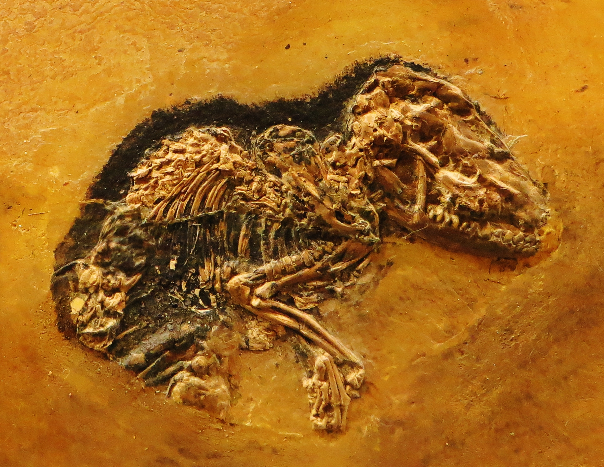 Fossil of Masillamys, an extinct mammal - Took the picture at Museum of Paleontology, Tuebingen